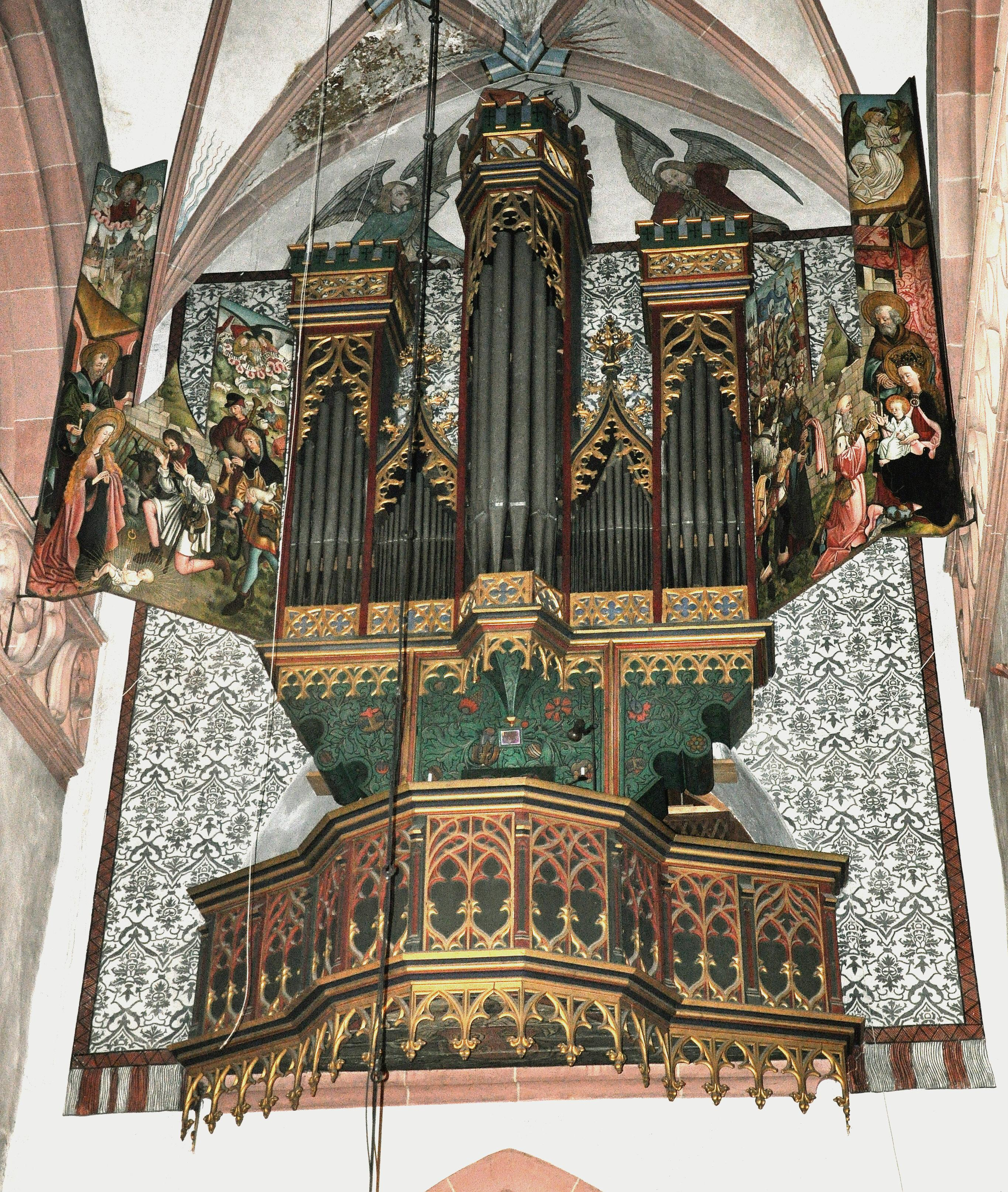 Kiedrich, Pfarrkirche St. Valentin, Orgel